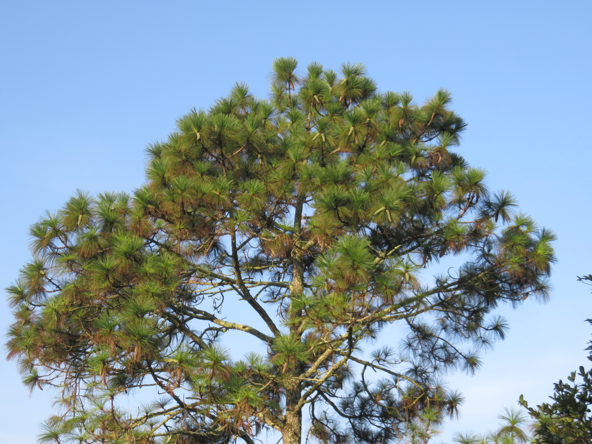 Pinus devoniana, Ruta Tequepexpan - Santa Maria de Oro, Nayarit, Mexico